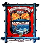 Escudo del municipio sonorense.